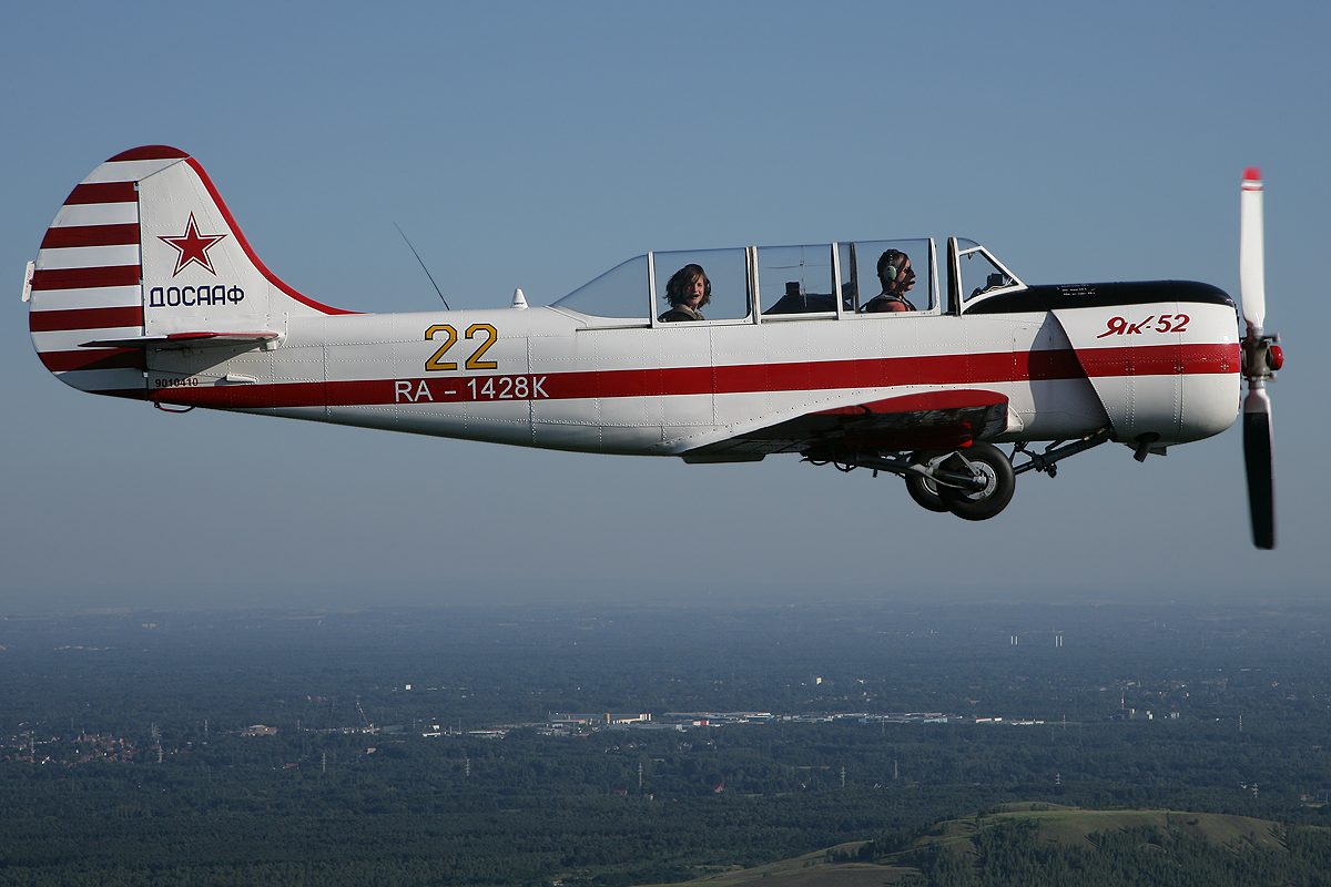 Yak-52 RA-1428K Yakkes Foundation